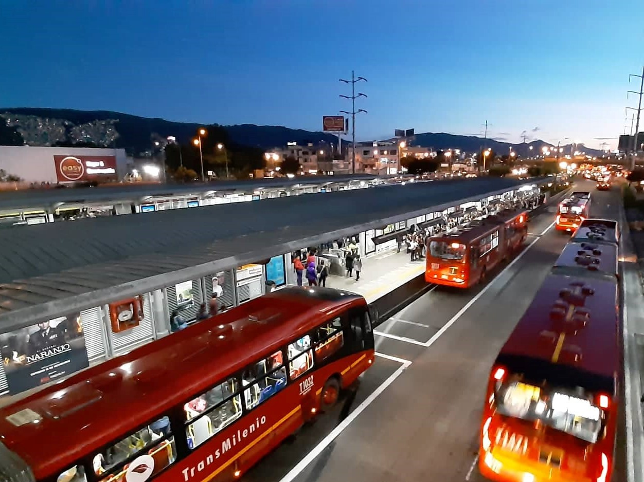 Foto del portal norte en horas de la tarde